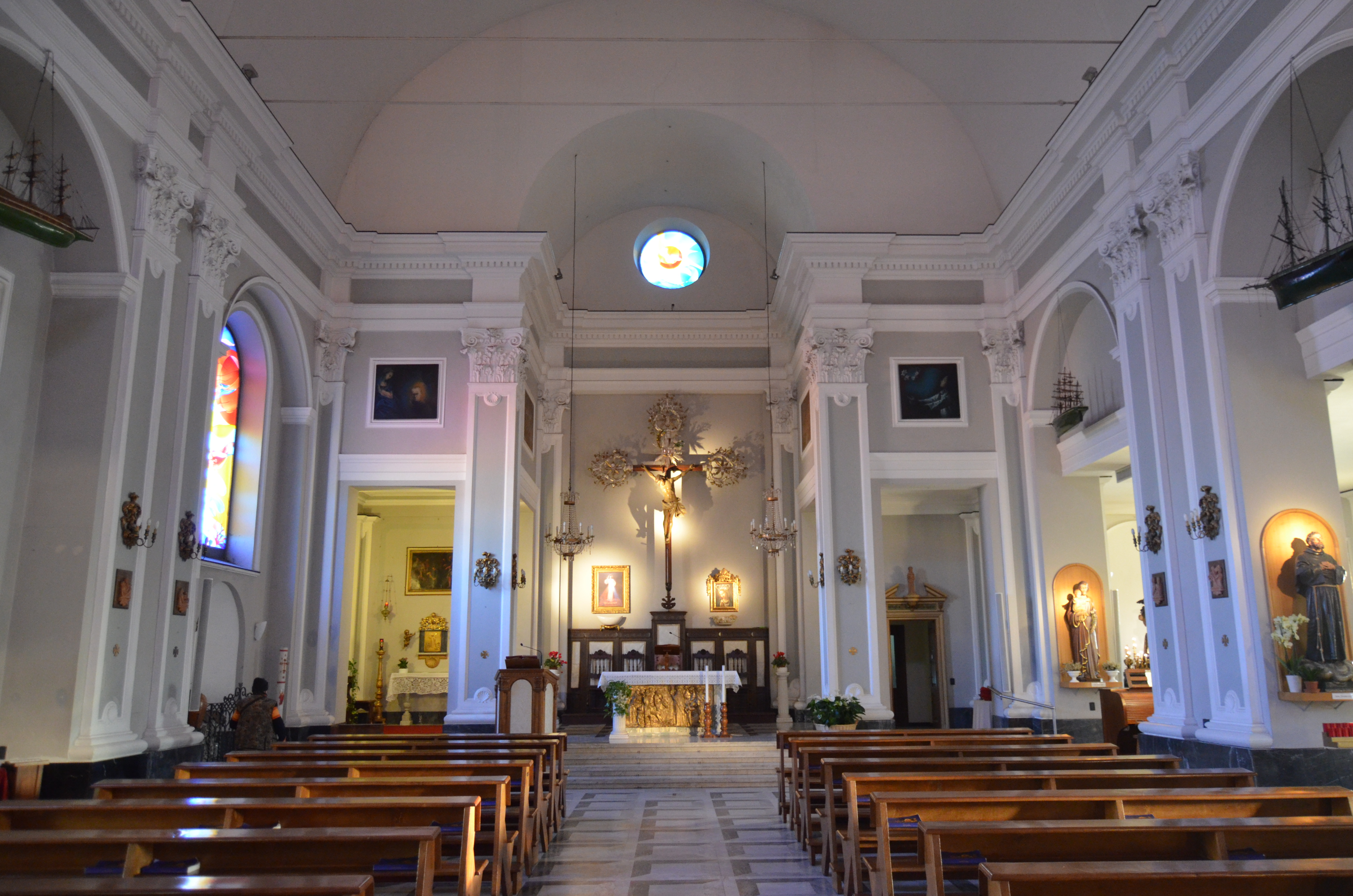 L'interno della chiesa di Sant'Antonio, Boccadasse, Genova, Liguria, Italia